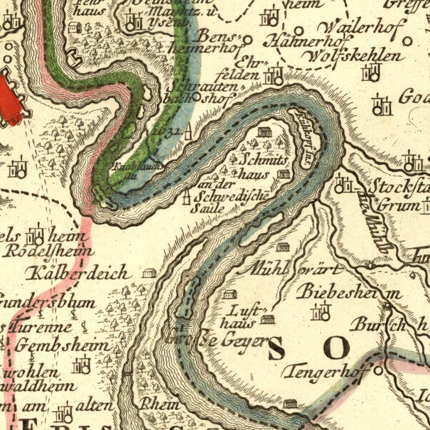 Crop der historischen Karte "Principatus & Comitatus superioris Ysenburgensis, ac Hanoviensis, nova et accurata Tabula cum Regionibus" (Südhessen, Rheiland-Pfalz). Auswahl: Der Kühkopf